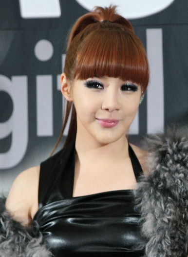 Park Bom in 2010 Melon Music Awards.